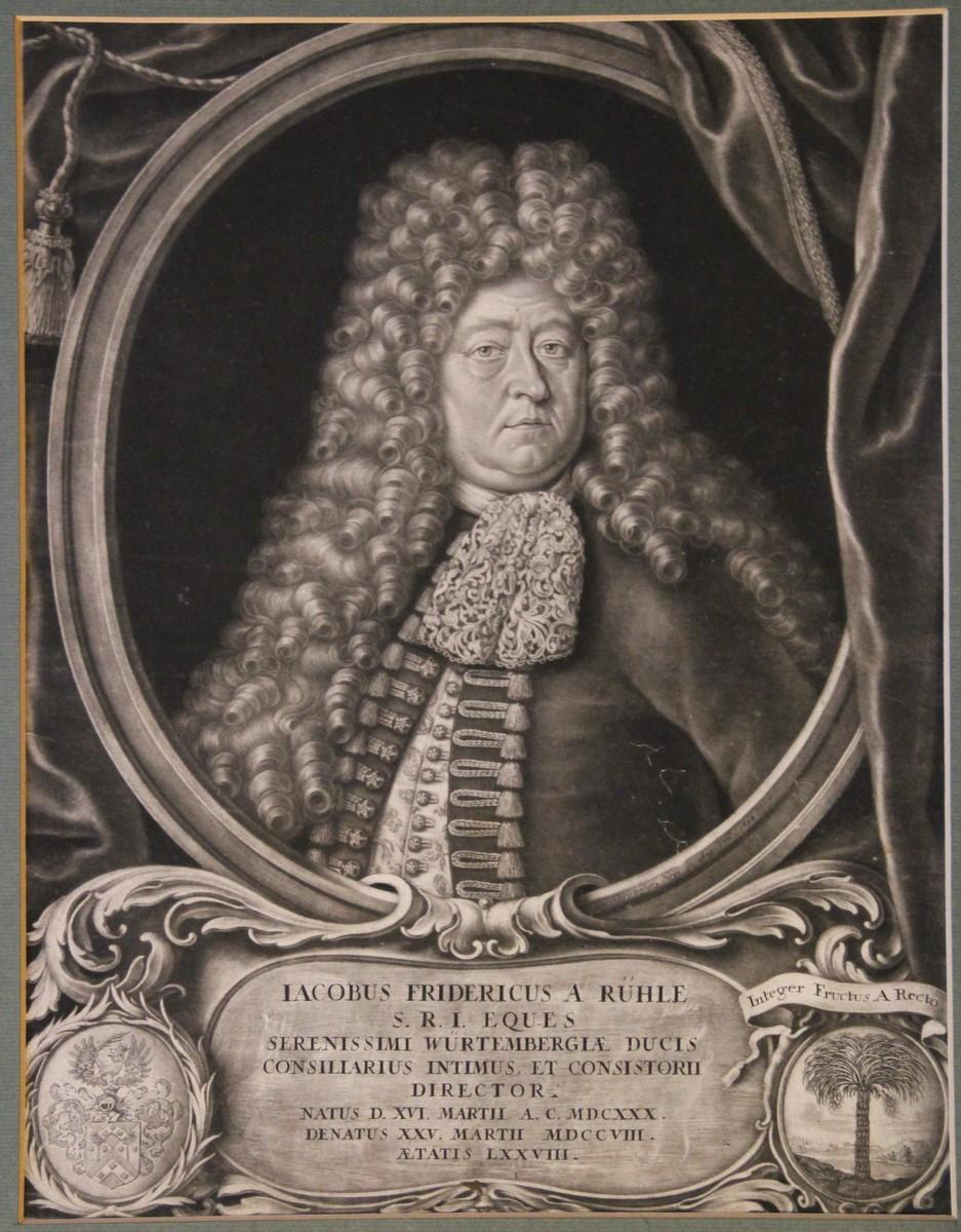 Jacob Friedrich Rühle. Mezzotinto 465 x 360 mm. Bis zum Bildrand beschnitten und alt auf Untersatzpapier aufgezogen.